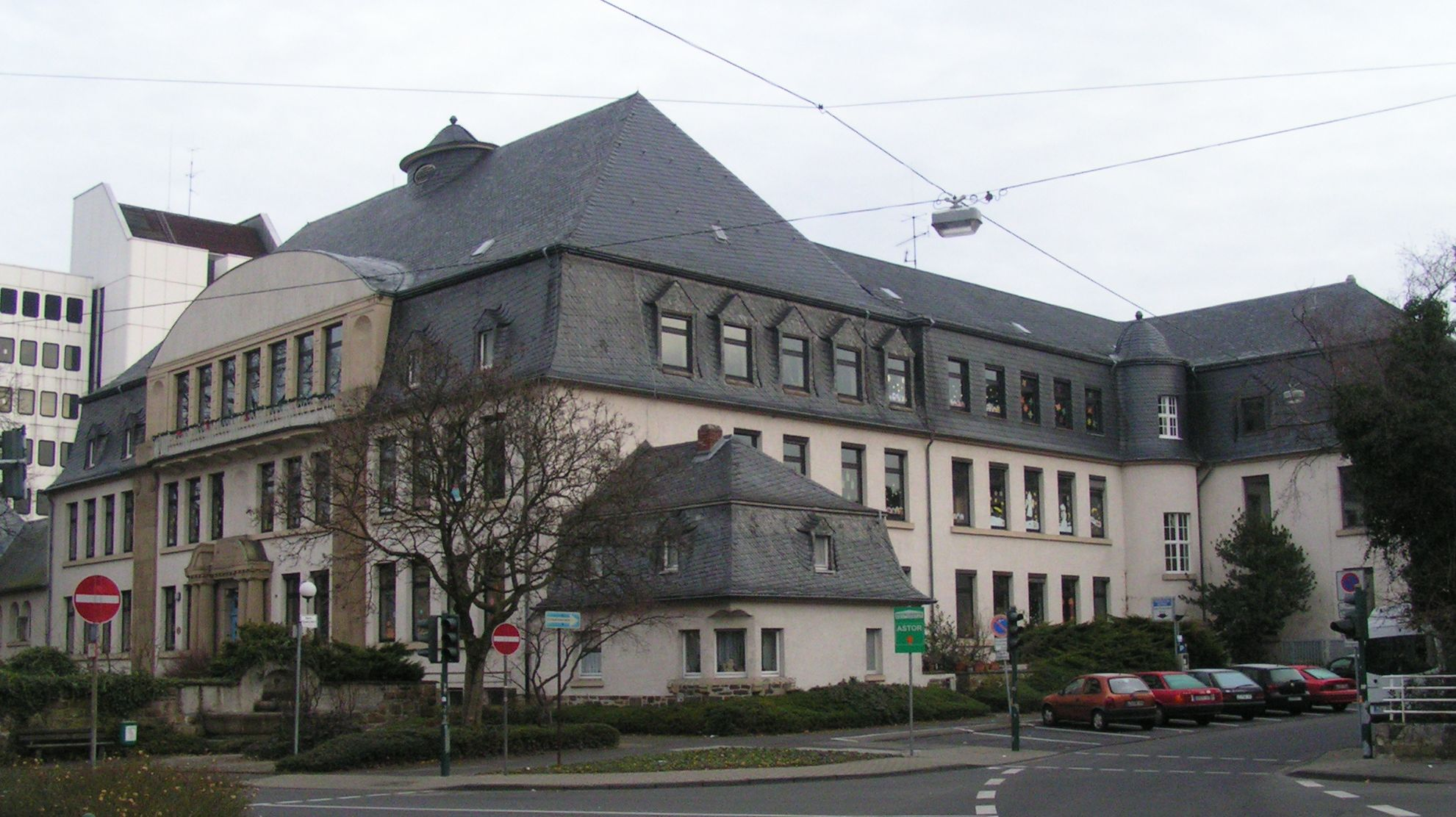 Städtische Hauptschule in Leverkusen-Opladen. Das Gebäude wurde ursprünglich für die Landrat-Lucas-Schule errichtet und von dieser bis 1976 genutzt.